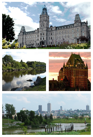 Montage créé spécifiquement pour représenter l'arrondissement La Cité-Limoilou qui possède des paysages très différents d'un endroit à l'autre.